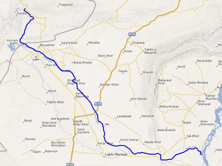 Kurram , carte réalisée sur umap This map may be incomplete, and may contain errors. Don't rely solely on it for navigation.